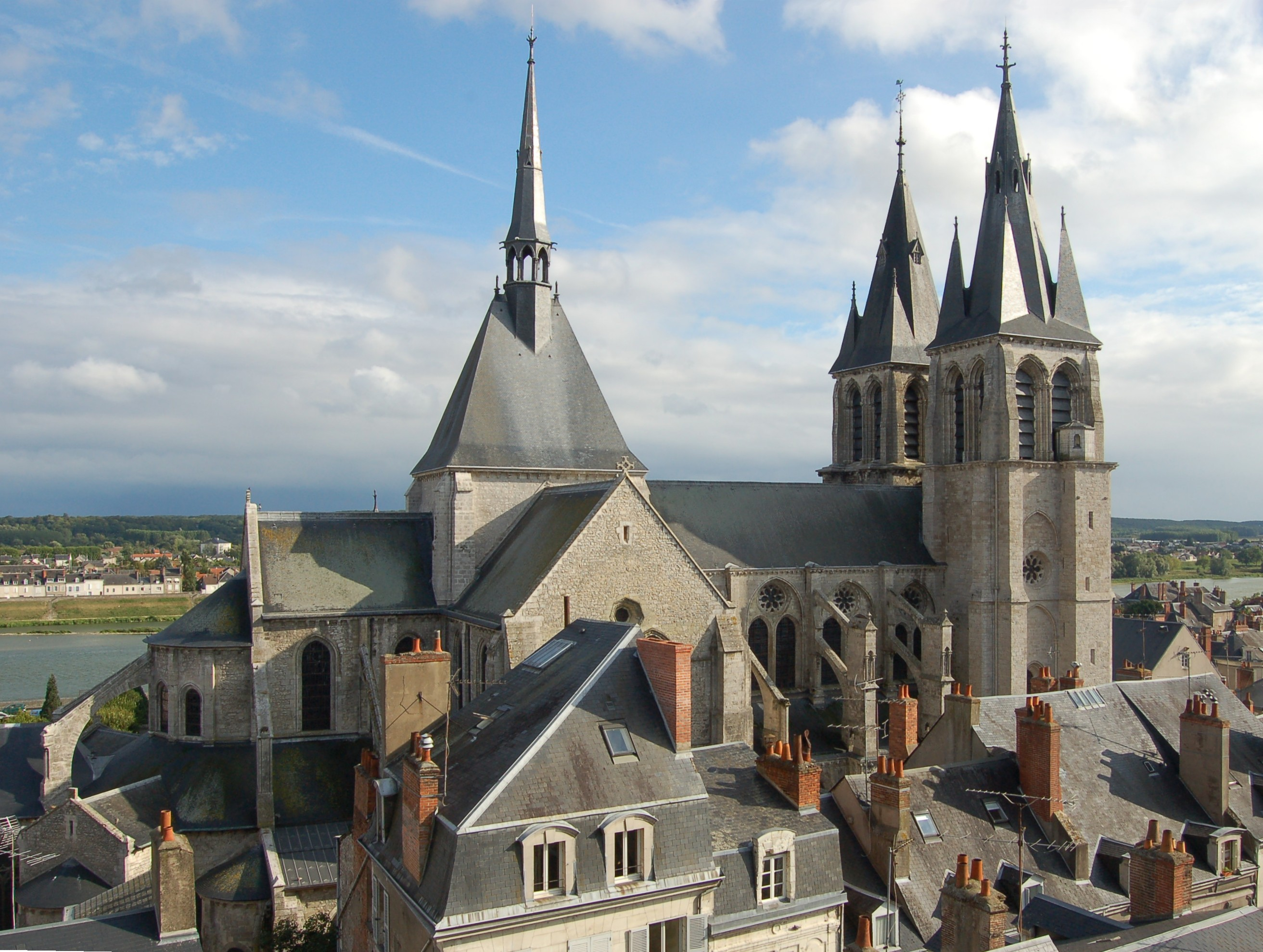 Eglise Saint-Nicolas in Blois